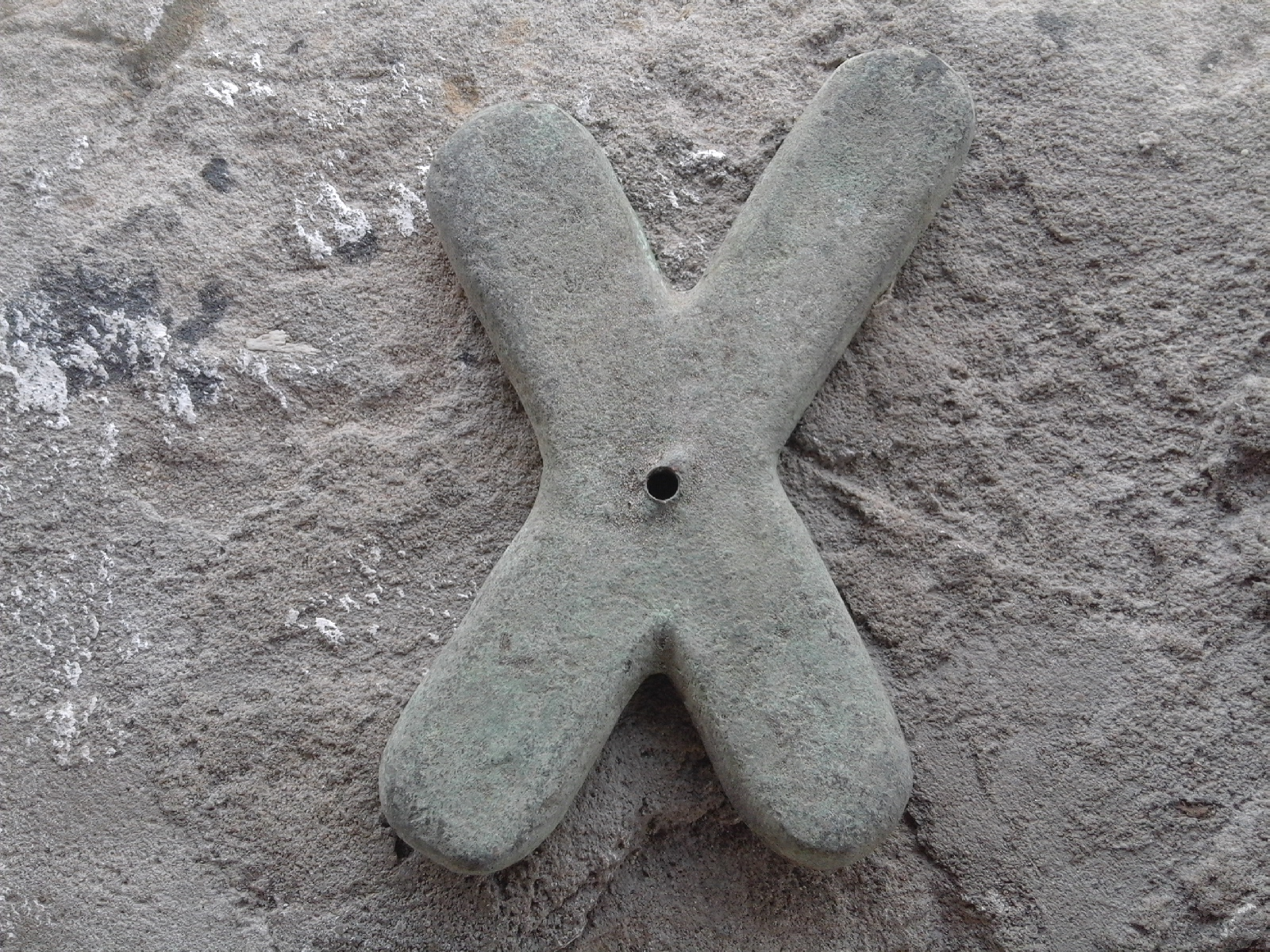 Ancienne unité de monnaie en cuivre jadis utilisée dans le Katanga